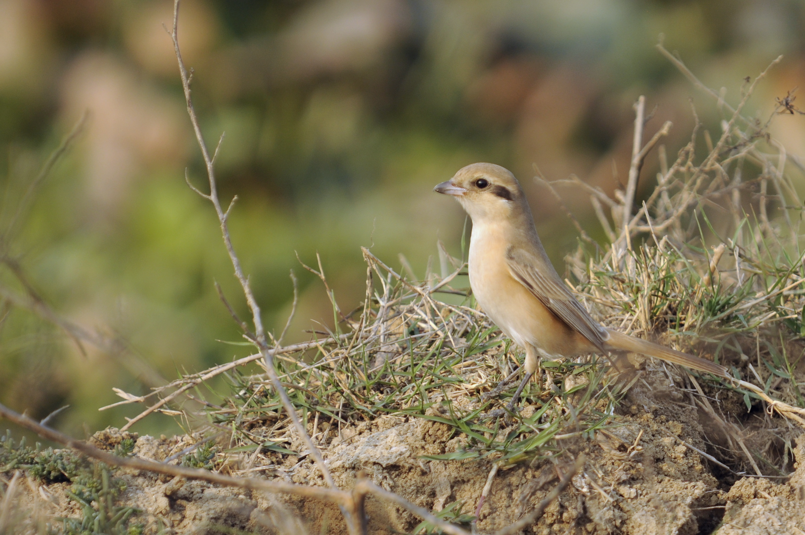 Isabelline Shrike Lanius isabellinus in Basai Wetland near Gurgaon (Gurugram), Haryana, India